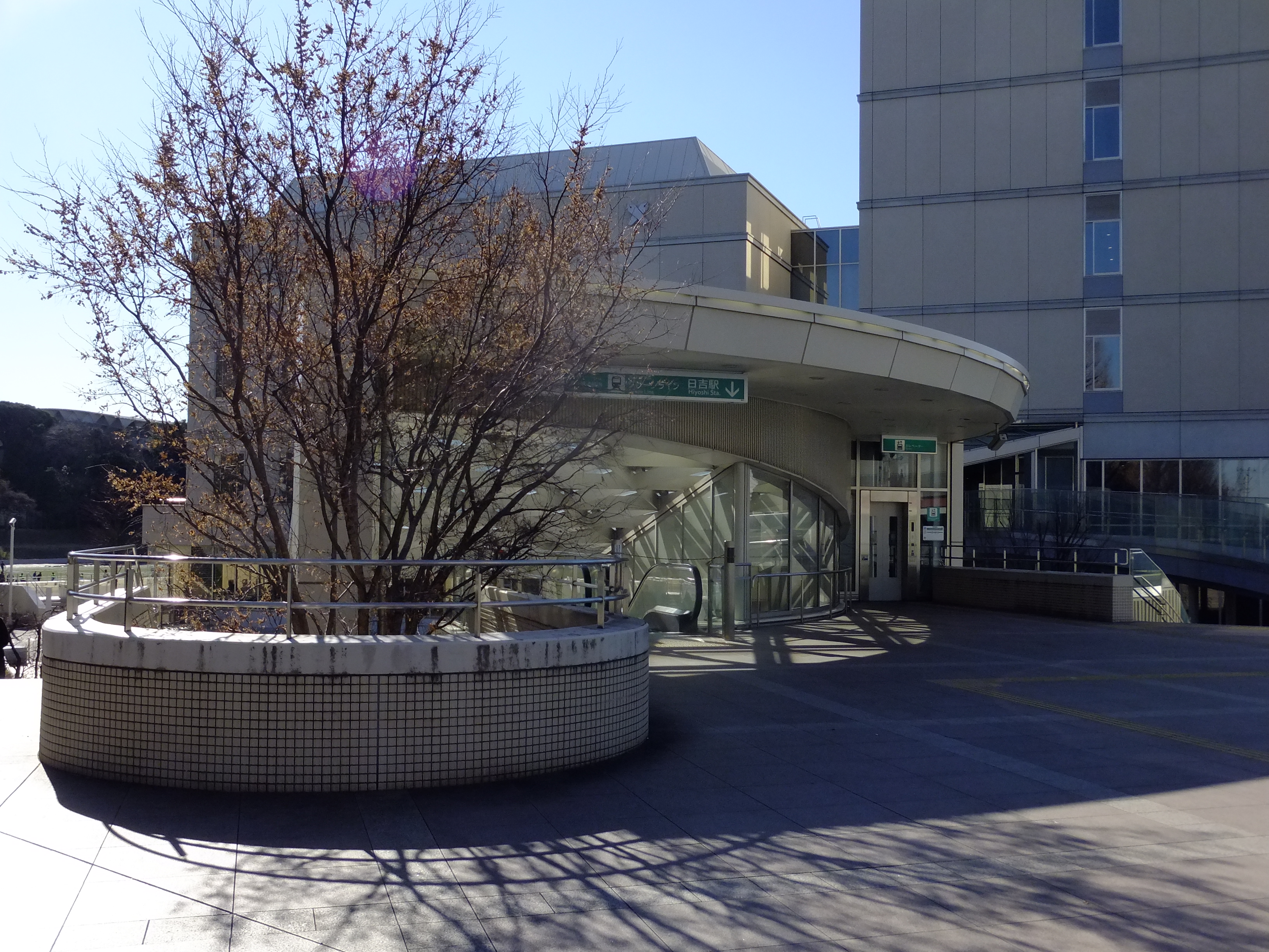 横浜市営地下鉄グリーンライン・日吉駅